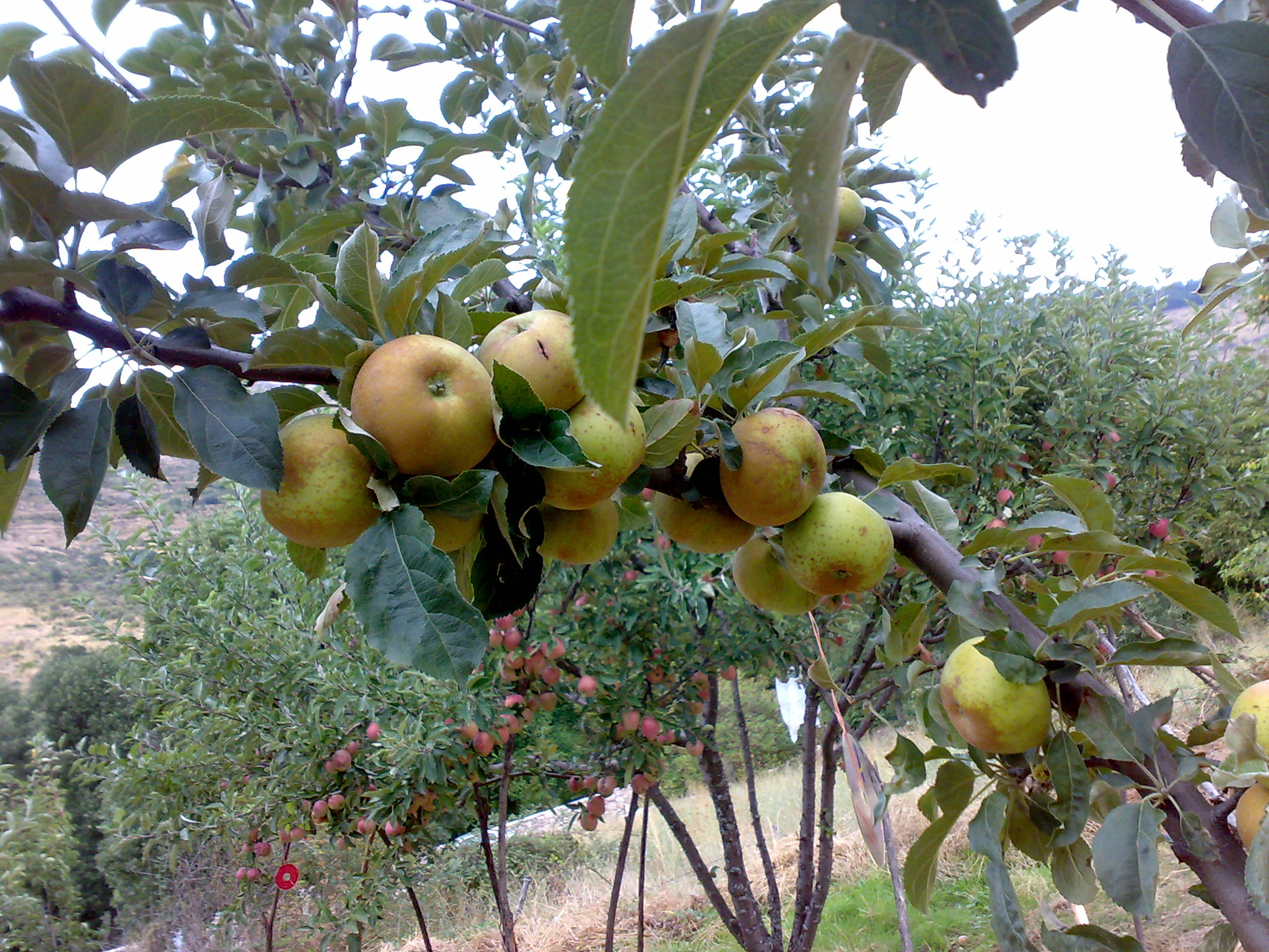 Manzanas de la variedad reineta blanca (Navacepedilla de Corneja; Ávila; España)